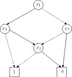 Darstellung eines reduzierten und geordneten Binary Decision Diagrams.